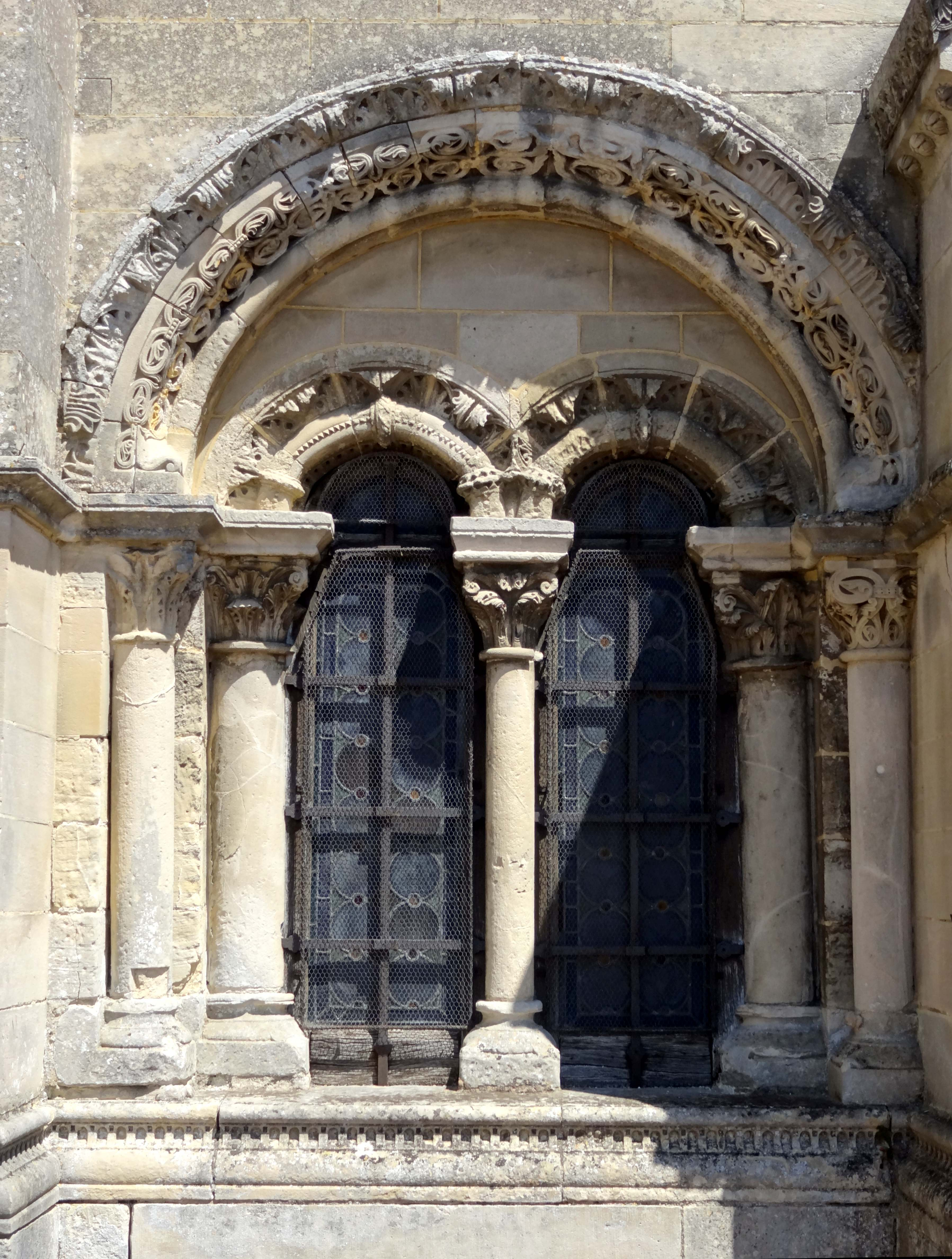 Église Sainte-Madeleine de Trie-Château - voir titre.